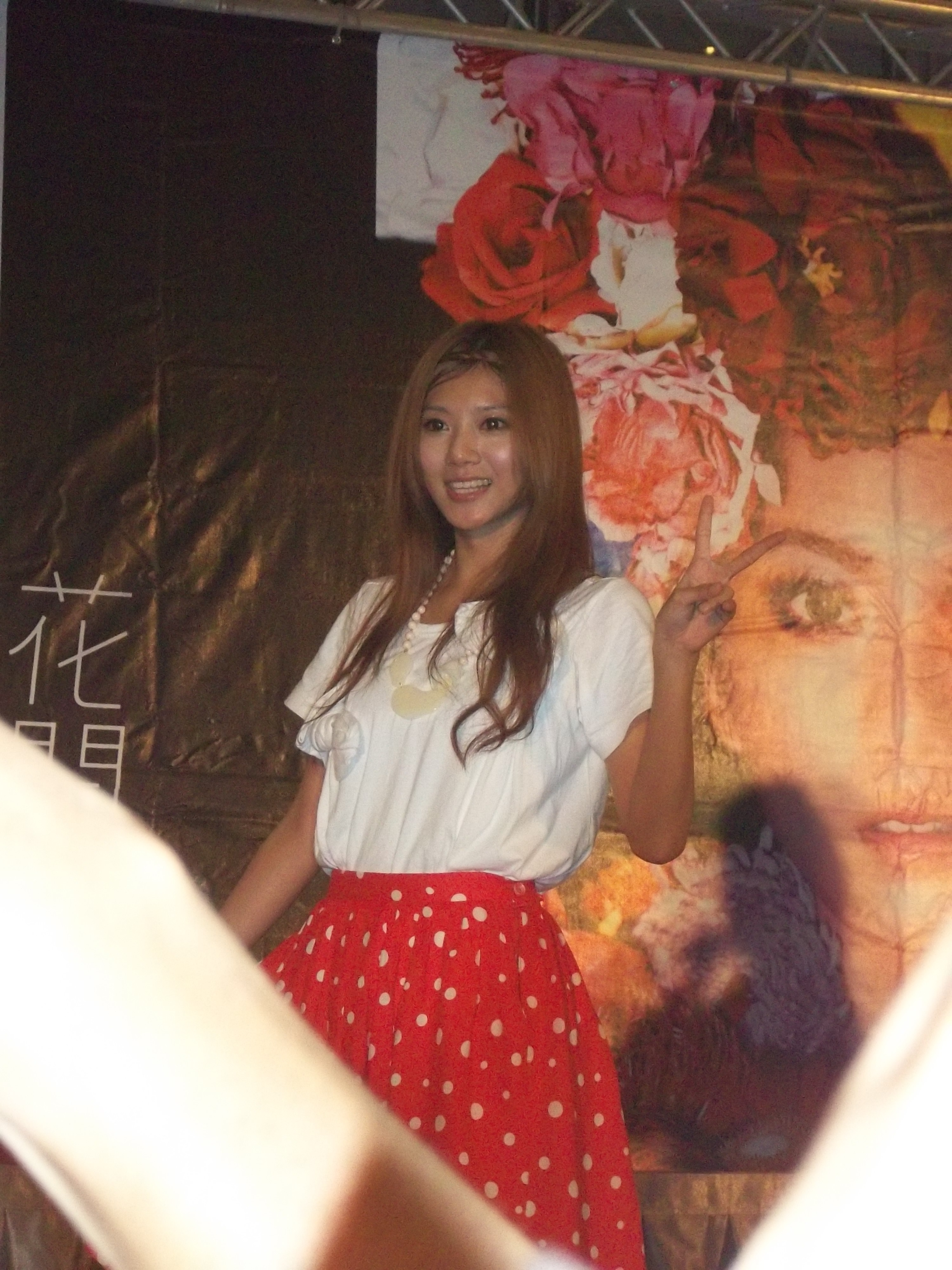 豆花妹在《情豆花開》台中簽唱會